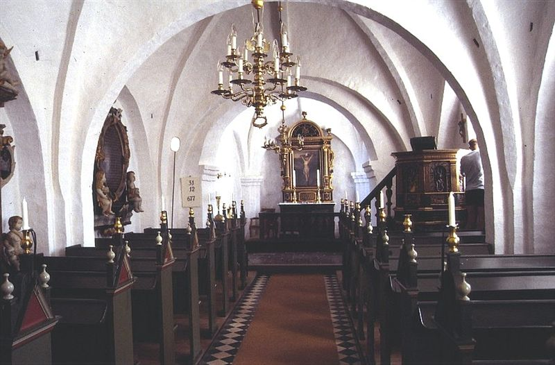 Sønder Kongerslev Kirke i Danmark. Skibet set mod øst